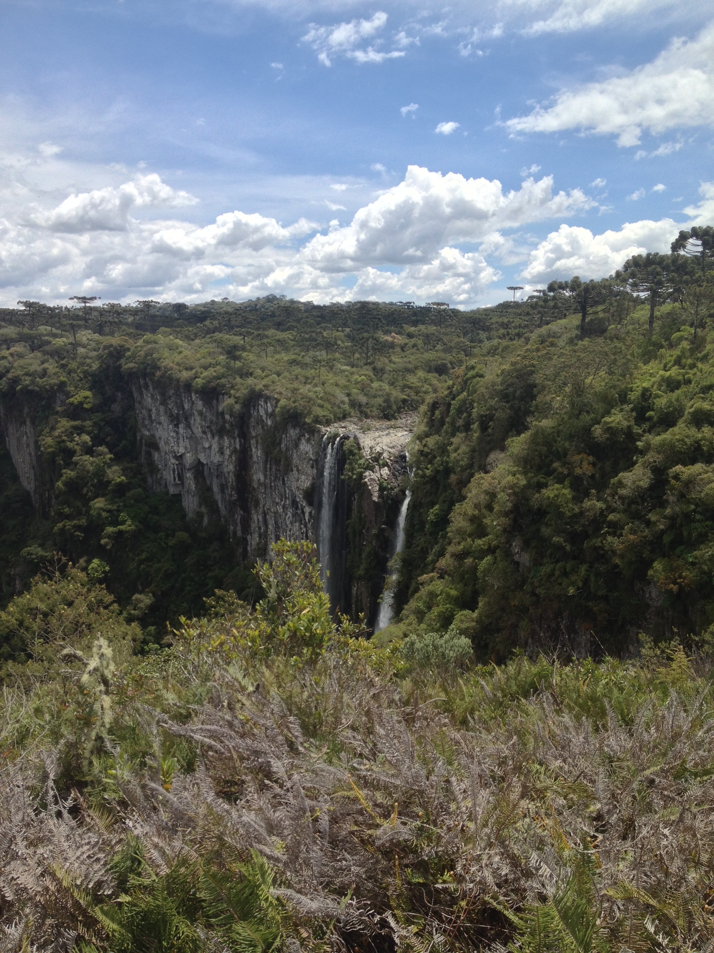 Visão aberta dos canions.